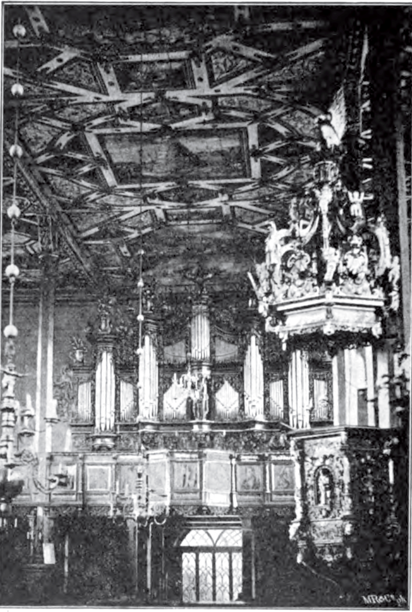 Orgel der Kirche in Insterburg, Orgelbauer Johann Preuß (1722-1798)